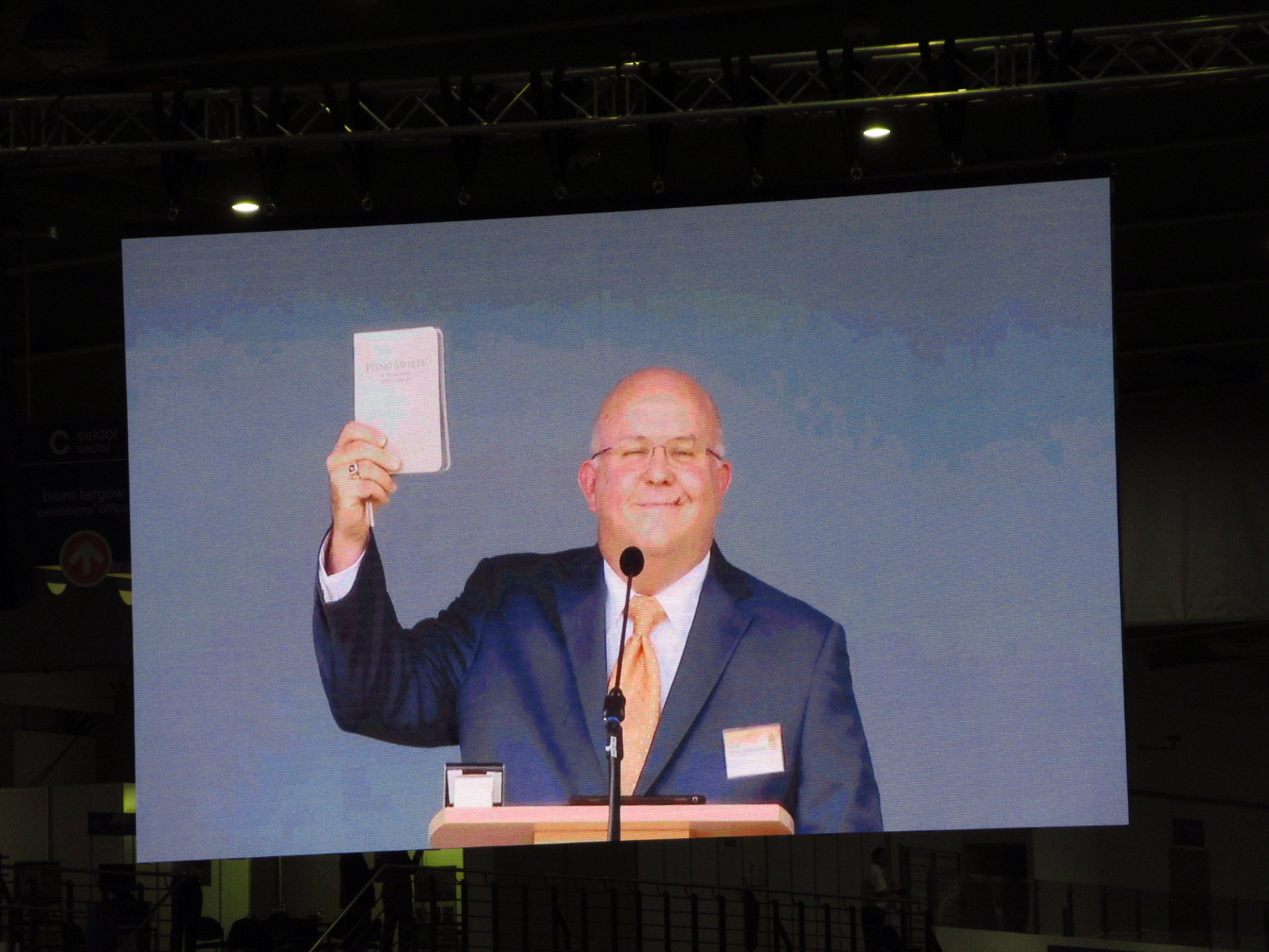 Kongres Świadków Jehowy w Poznaniu na terenie Międzynarodowych Targów Poznańskich pod hasłem: "Bądź odważny!", Który odbył się w dniach 10-12 sierpnia 2018.